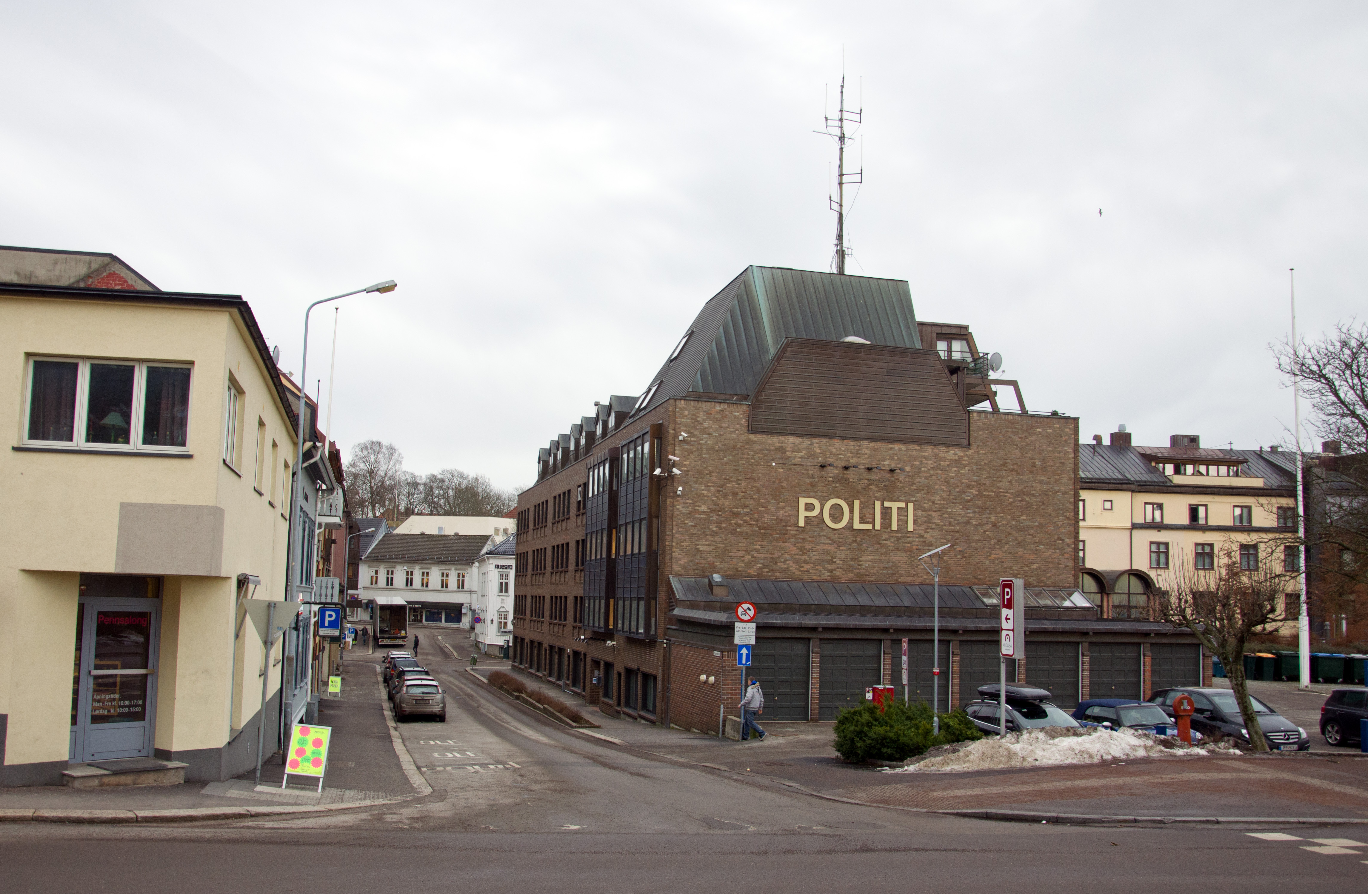 Politihuset, Baglergaten 2 i Tønsberg